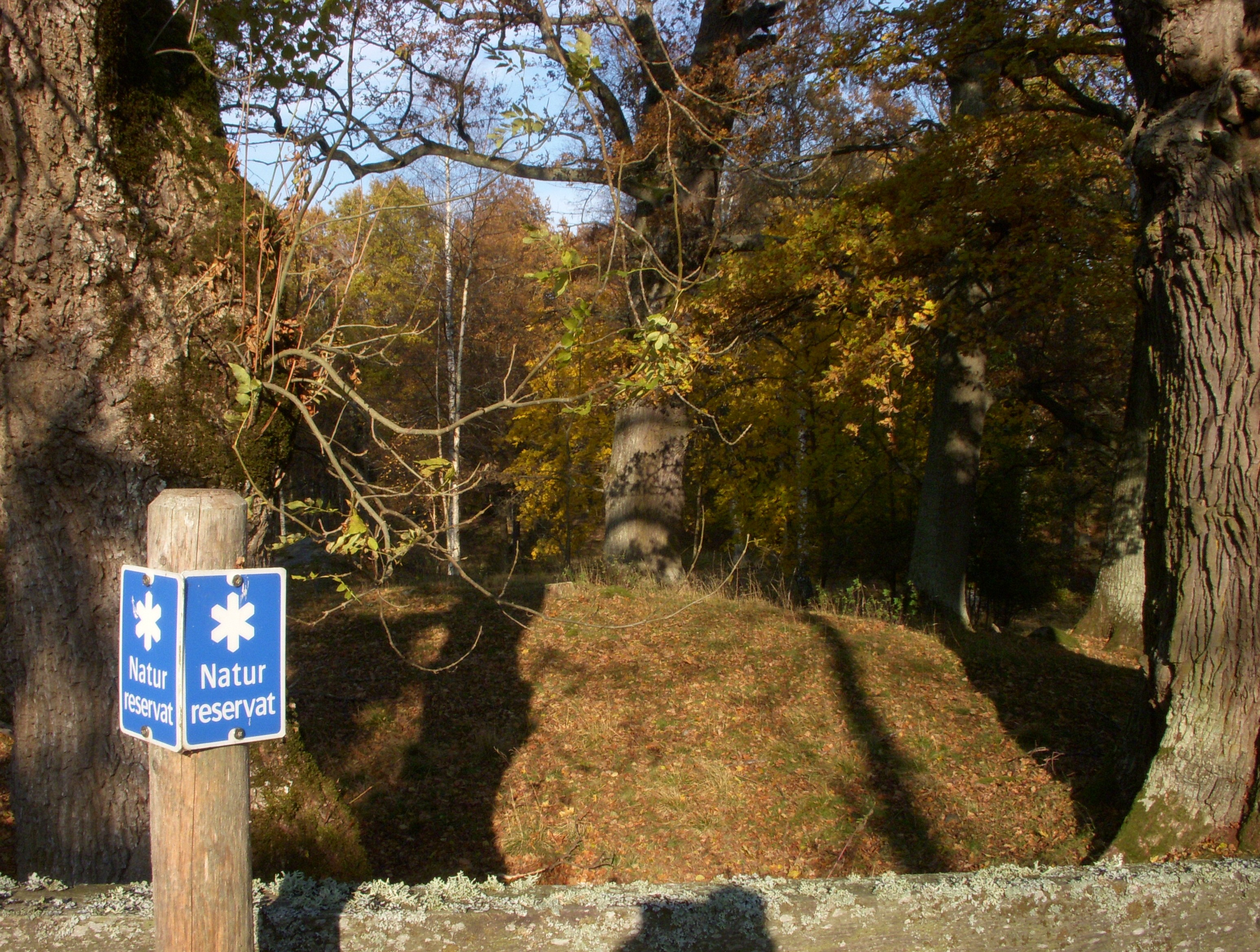 Tullgarns naturreservat norr om Tullgarns slott